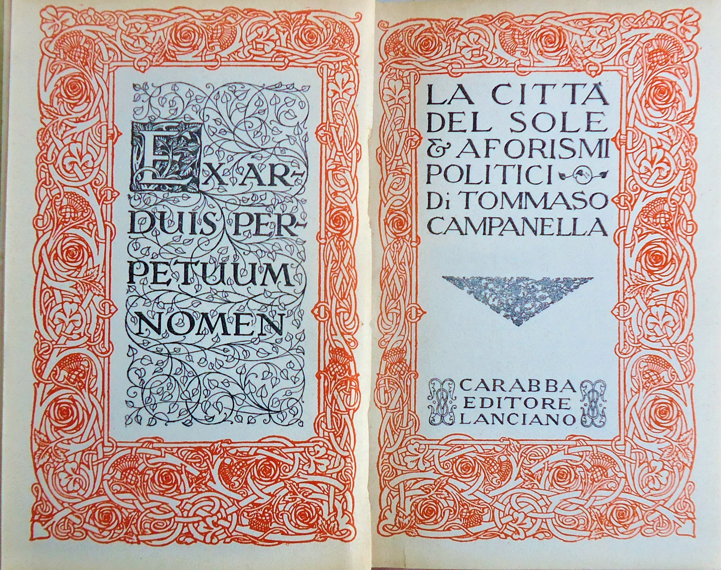 Collana Scrittori italiani e stranieri. Testo secondo il codice Casanatense 1587 e il codice della Biblioteca nazionale di Napoli XII E 53. Introduzione di Domenico Ciampoli. (Coll. F. Samaritani-Campanella)